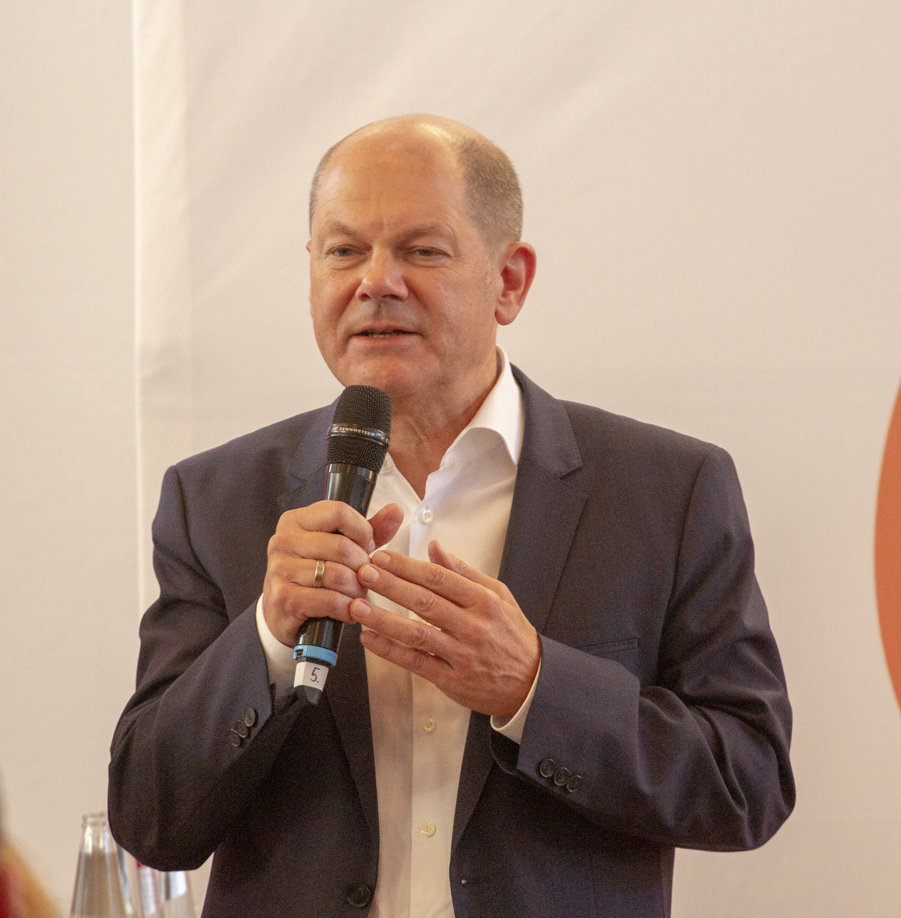 Olaf Scholz bei der SPD Regionalkonferenz zur Wahl des SPD-Vorsitzes am 10. September 2019 in Nieder-Olm.